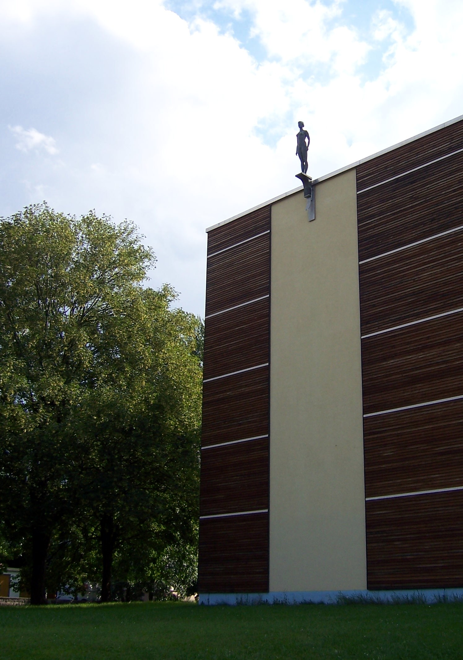 Skulptur Ingrid Krämer auf dem Dach der Sprunghalle, Komplex Freiberger Straße Dresden.